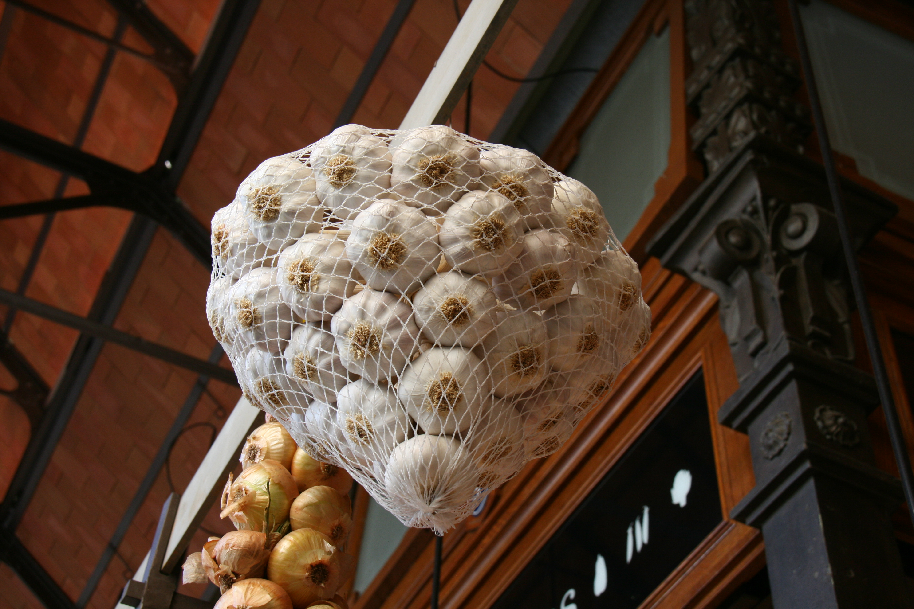 Ristra de ajos